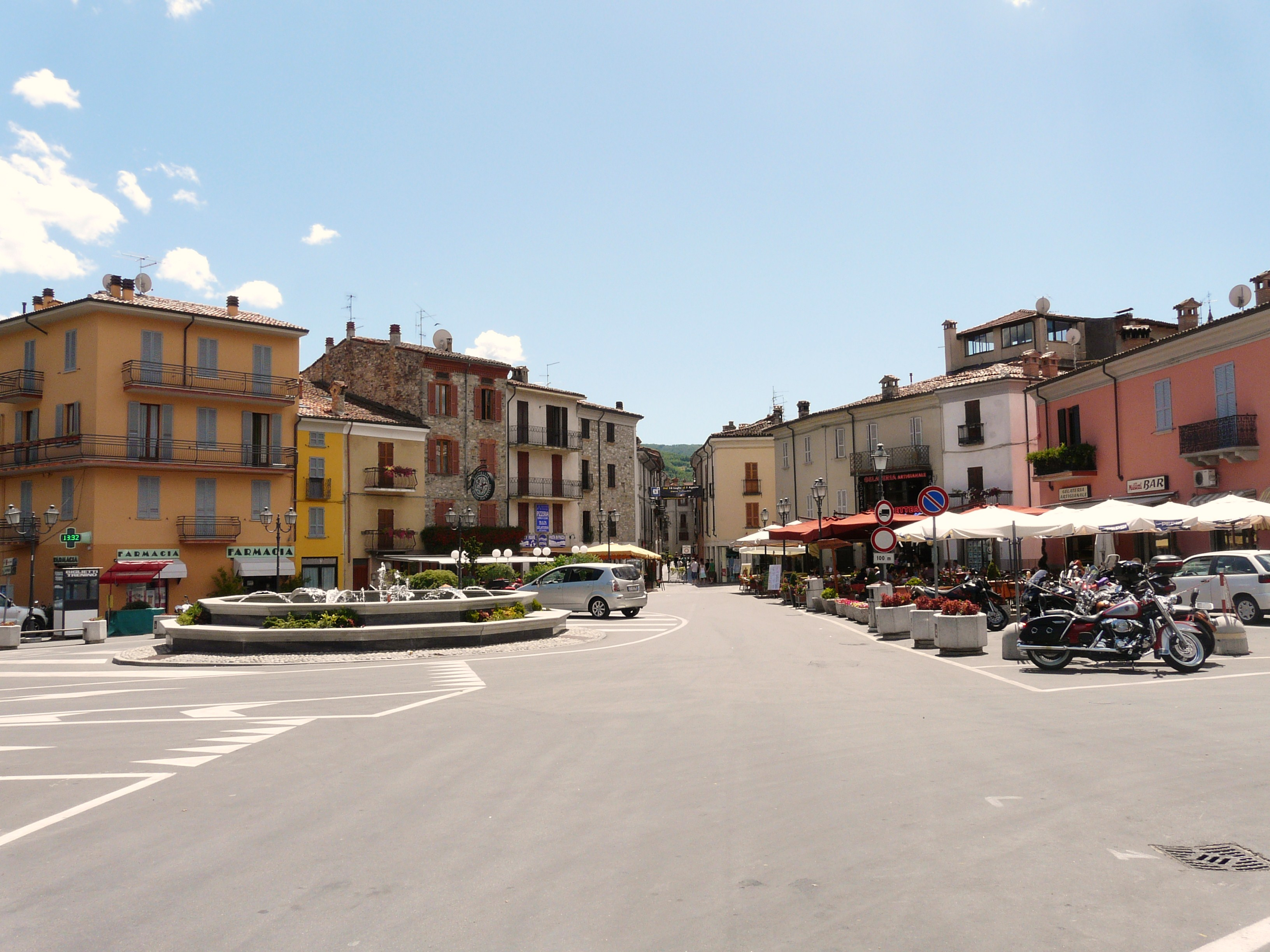 Piazza di Bobbio, Emilia-Romagna, Italia